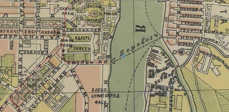 Большеохтенский перевоз через Большую Неву